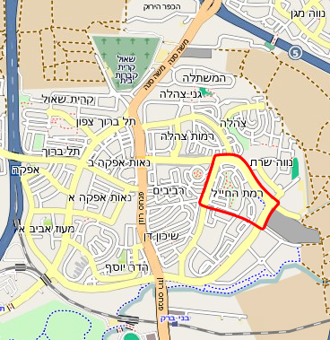 Ramat HaHil, Tel Aviv